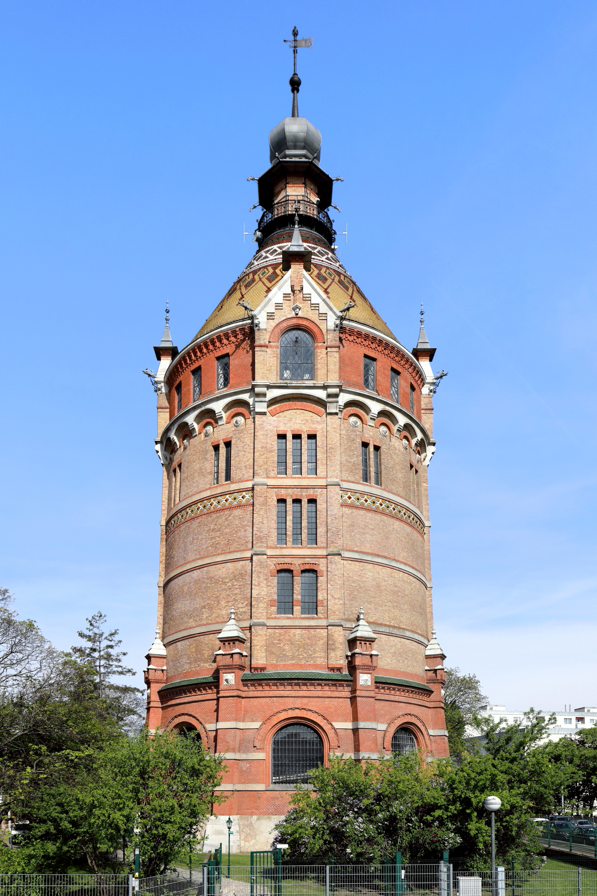 Der Wasserturm im 10. Wiener Gemeindebezirk Favoriten.Er wurde von Franz Borkowitz und Johann Scheiringer entworfen und vom Stadtbaumeister Alois Schumacher 1898/99 errichtet. Der Wasserturm auf der Kuppe des Wienerberges hat eine Gesamthöhe von 67 Metern (inklusive Wetterstange) und konnte rund 1.000 Kubikmeter Wasser speichern. Damit wurden die hoch gelegenen Gebiete des 10. und 12. Bezirks mit Trinkwasser versorgt. Nach Fertigstellung der II. Wiener Hochquellenleitung 1910 war der Turm nur mehr fallweise in Betrieb und wurde ab 1956 nicht mehr für die Wasserversorgung genutzt.